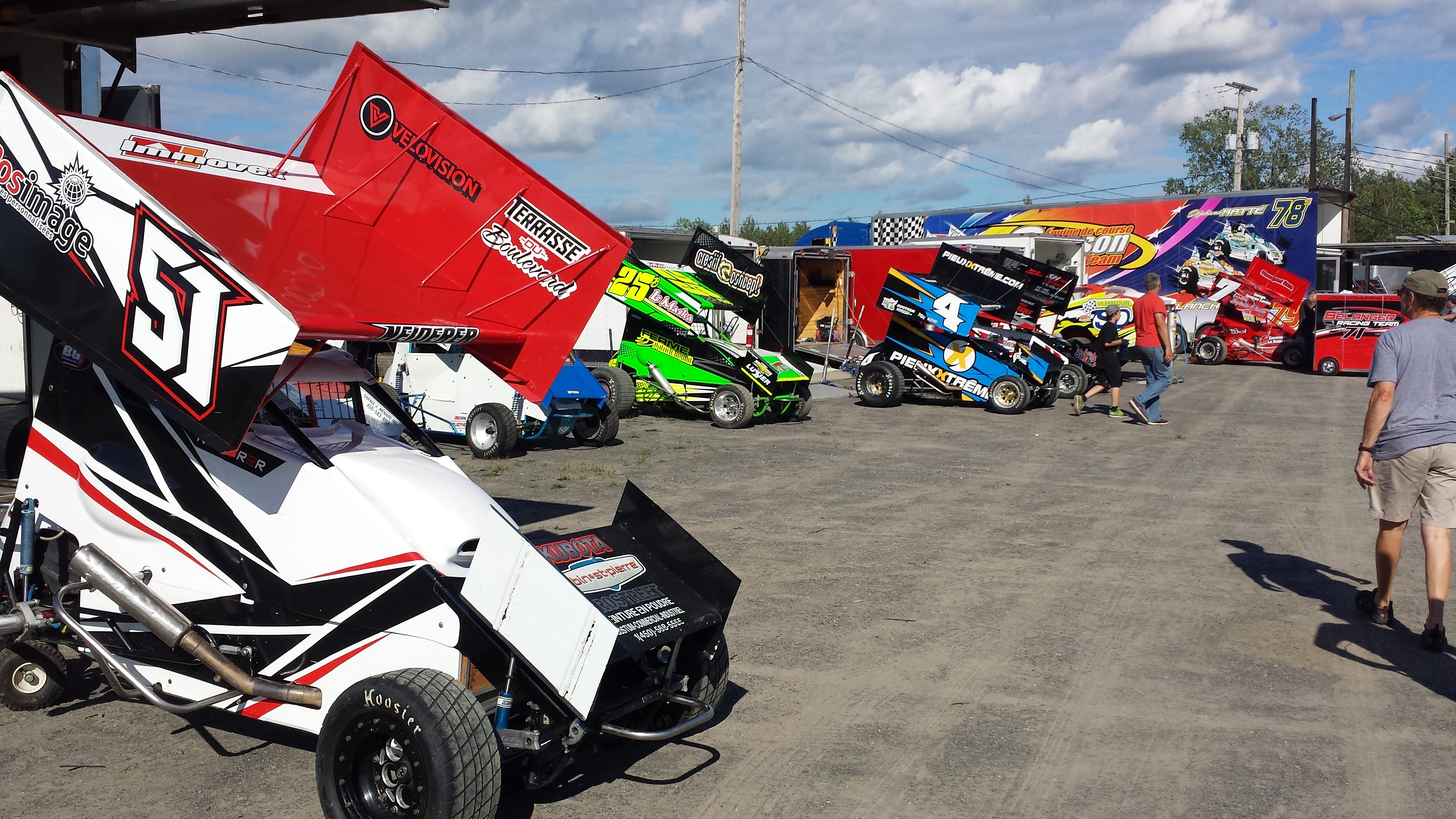 Voitures de la série québécoise Lightning Sprint - Autodrome Drummond - 26 juillet 2016